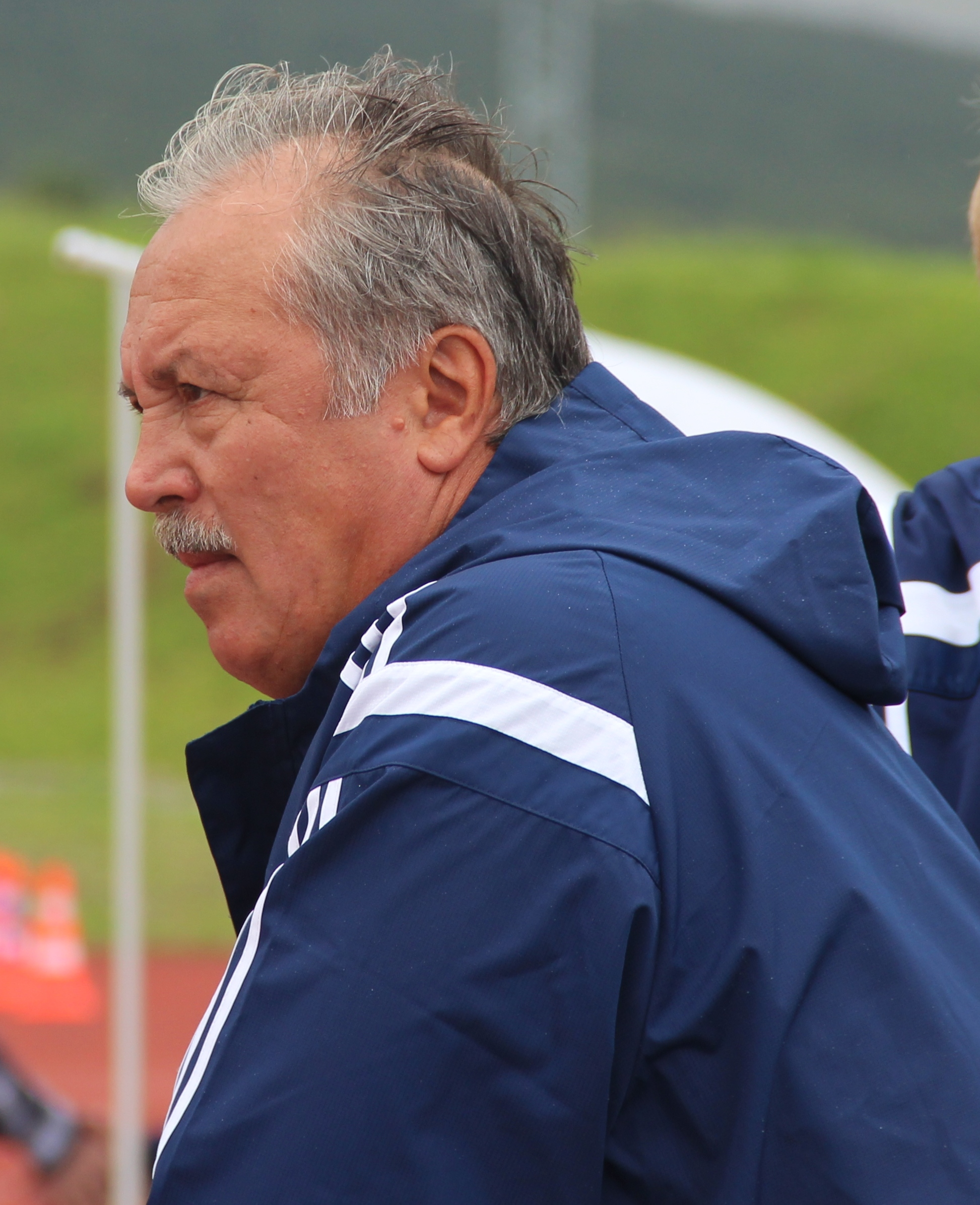 Fail Mirgalimov